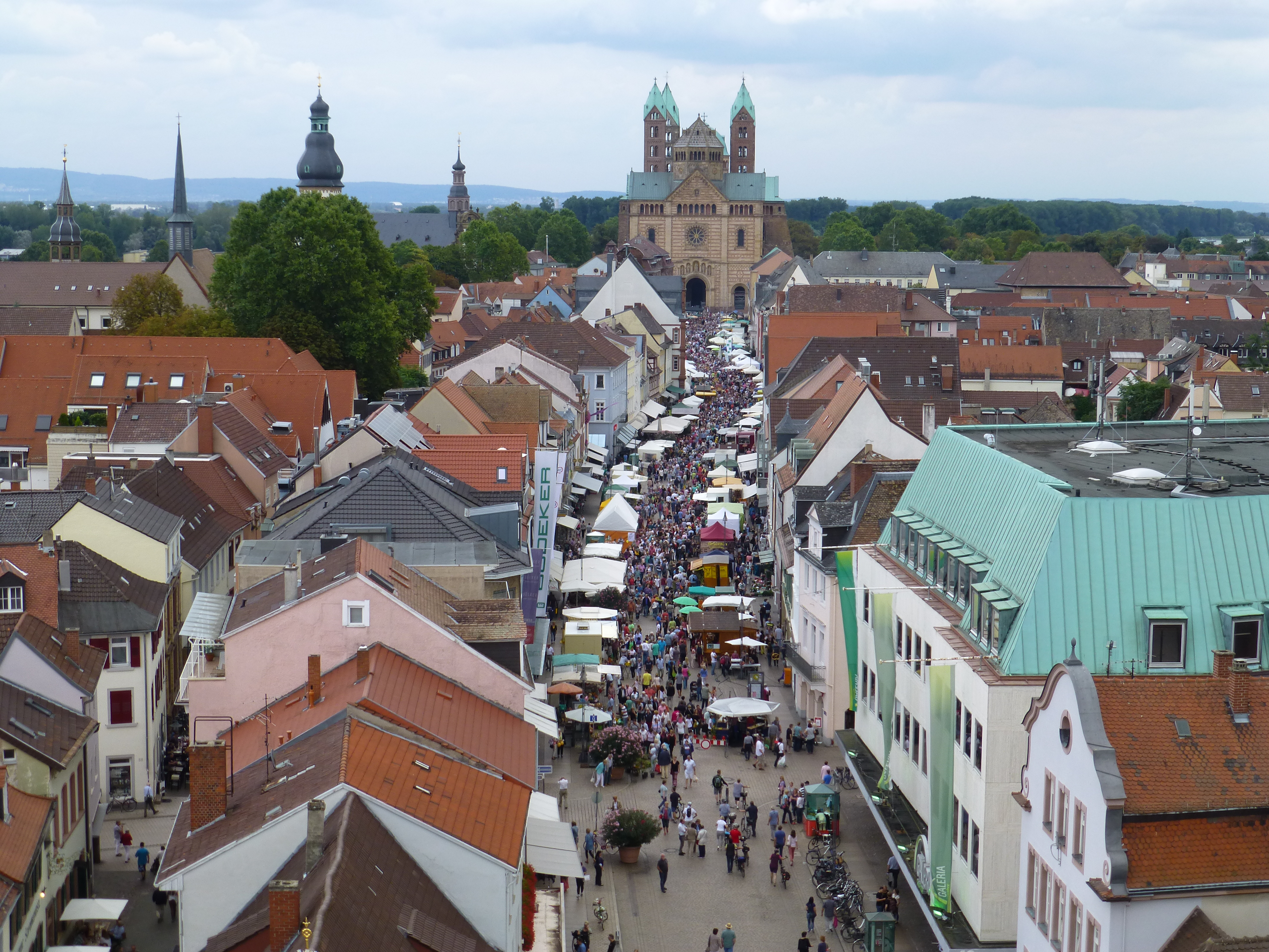 Blick vom Altpörtel über die Maximilianstraße zum Kaiserdom